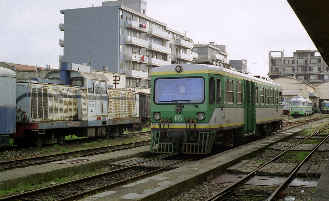 Automotrice ADe 92 delle Ferrovie della Sardegna in sosta a Macomer